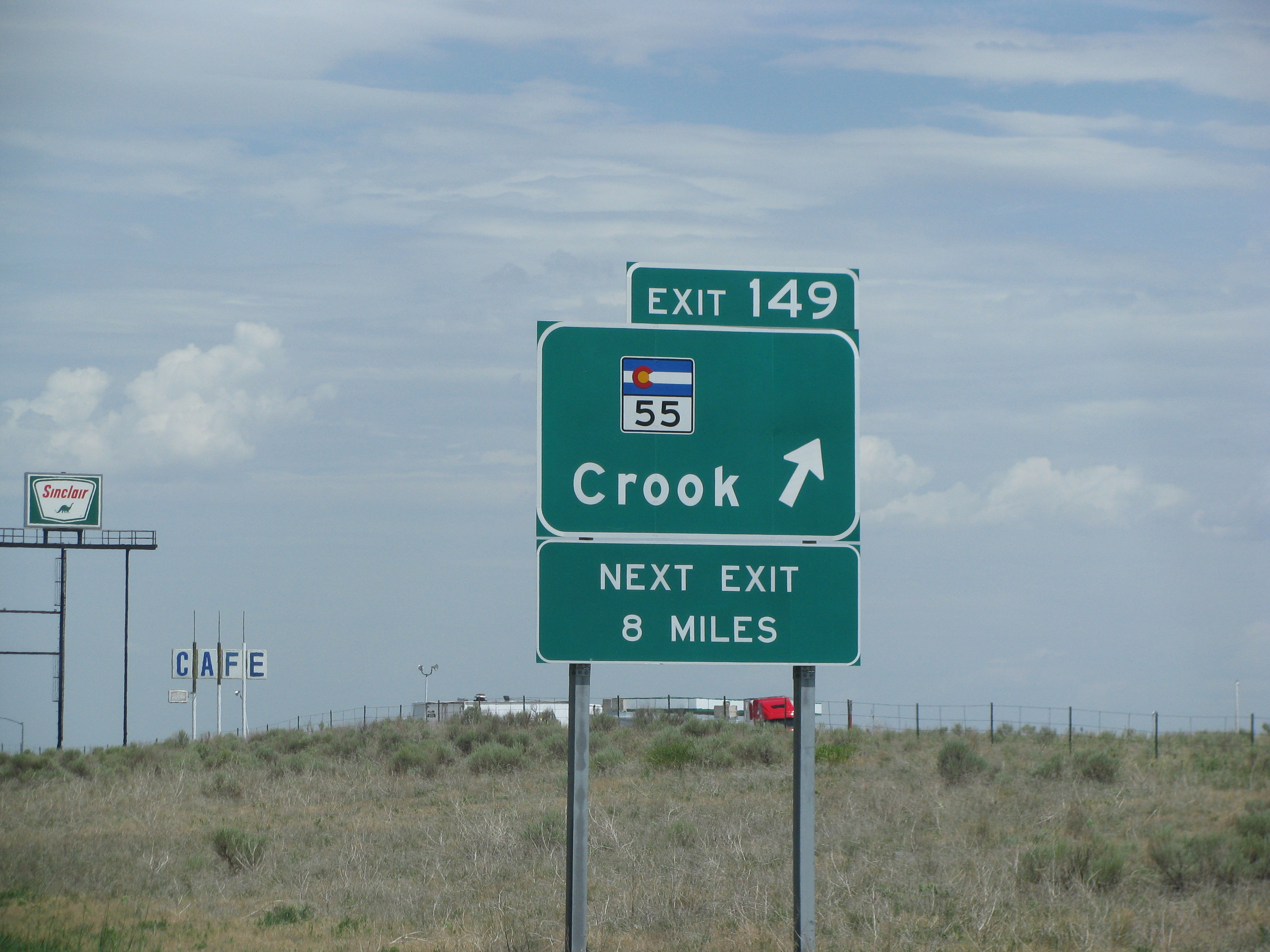 next exit